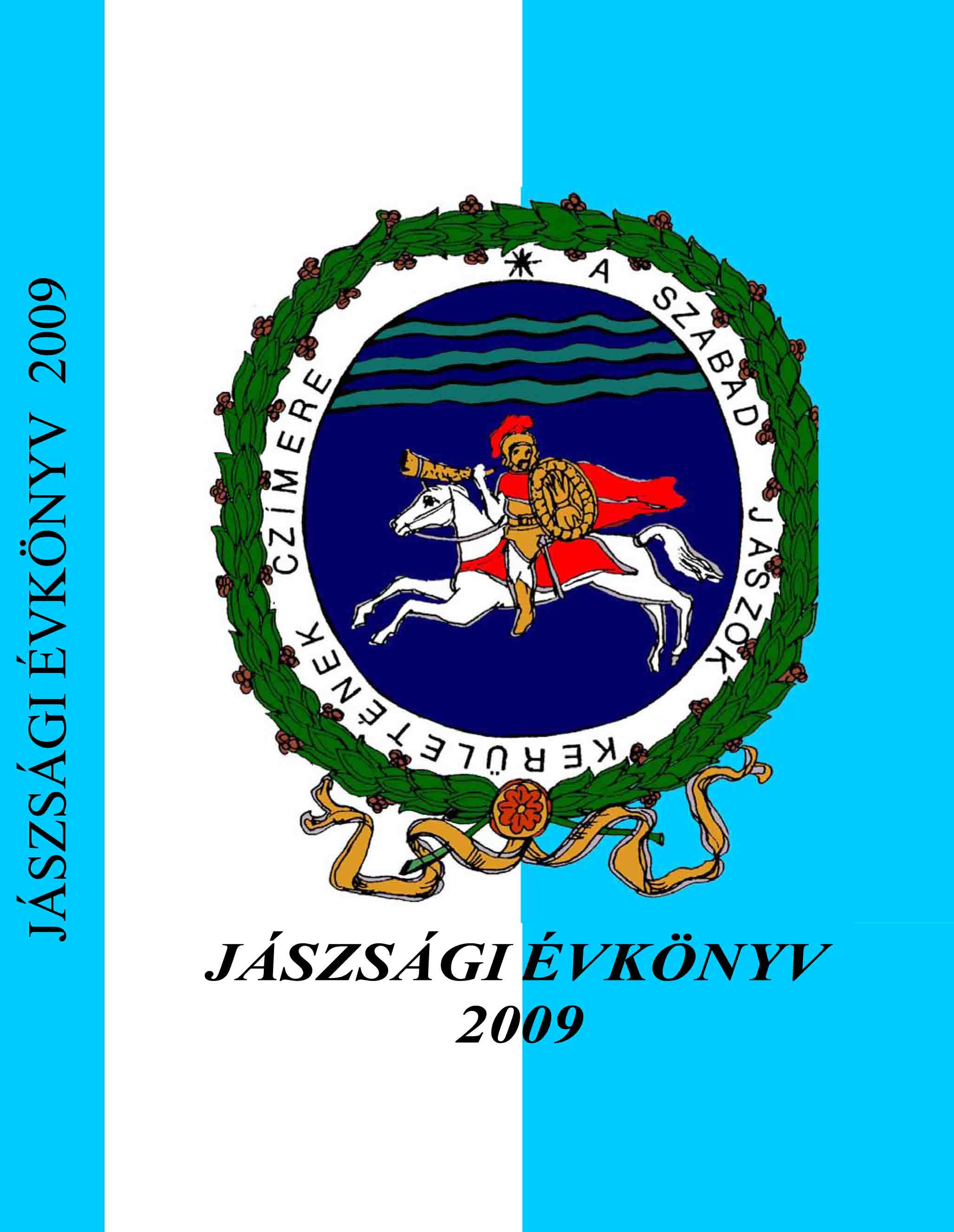 A Jászsági Évkönyv borítója.